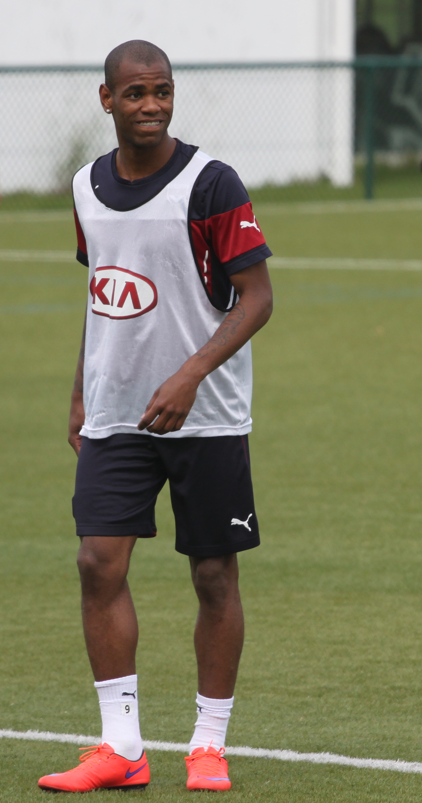 Rolán à l'entraînement.